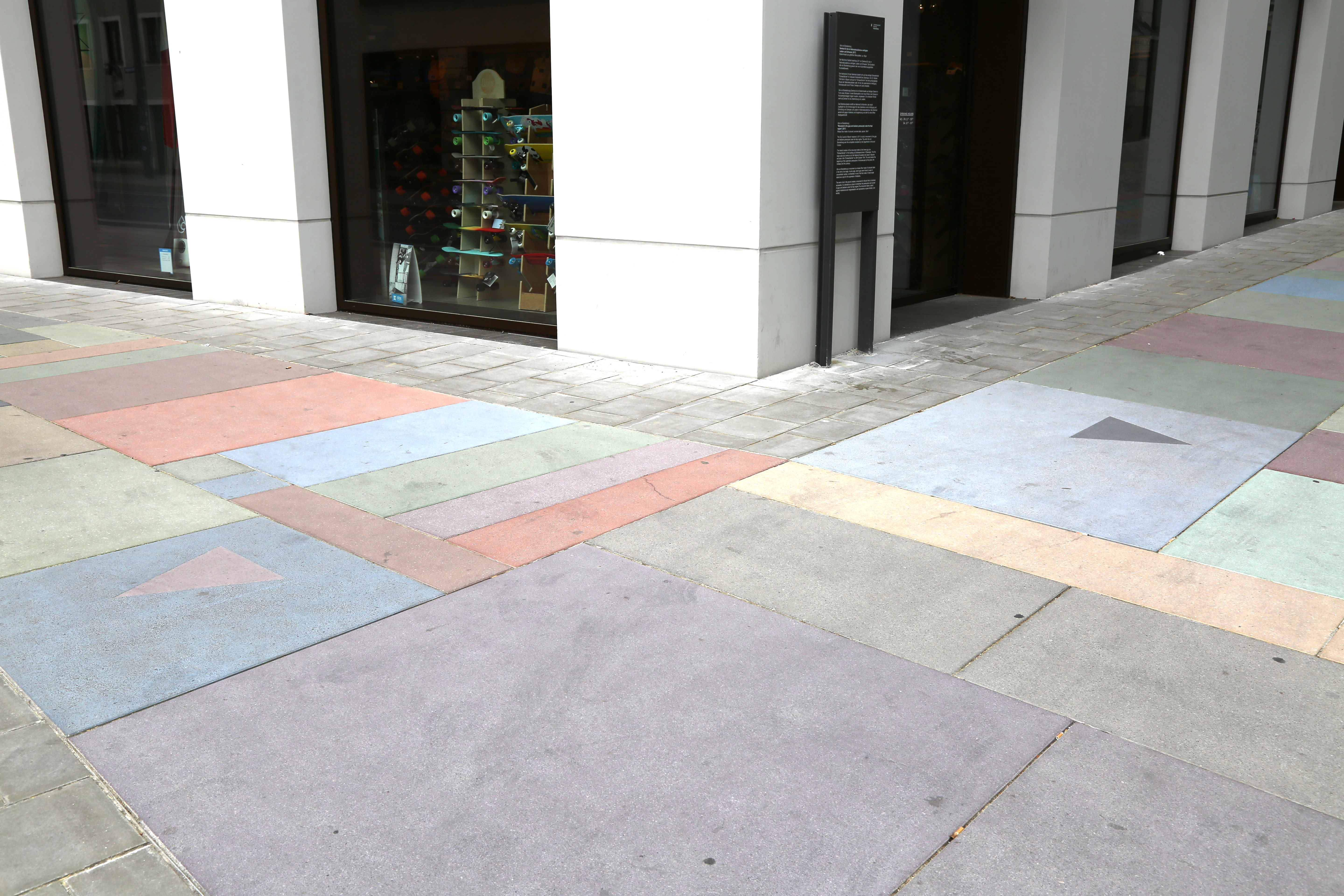 Denkmal für die in der NS-Zeit verfolgten Lesben und Schwulen. Ecke Oberanger, Dultstraße am Ort des ehemaligen Lokals "Schwarzfischer", wo 1934 die erste Razzia gezielt gegen Schwule stattfand